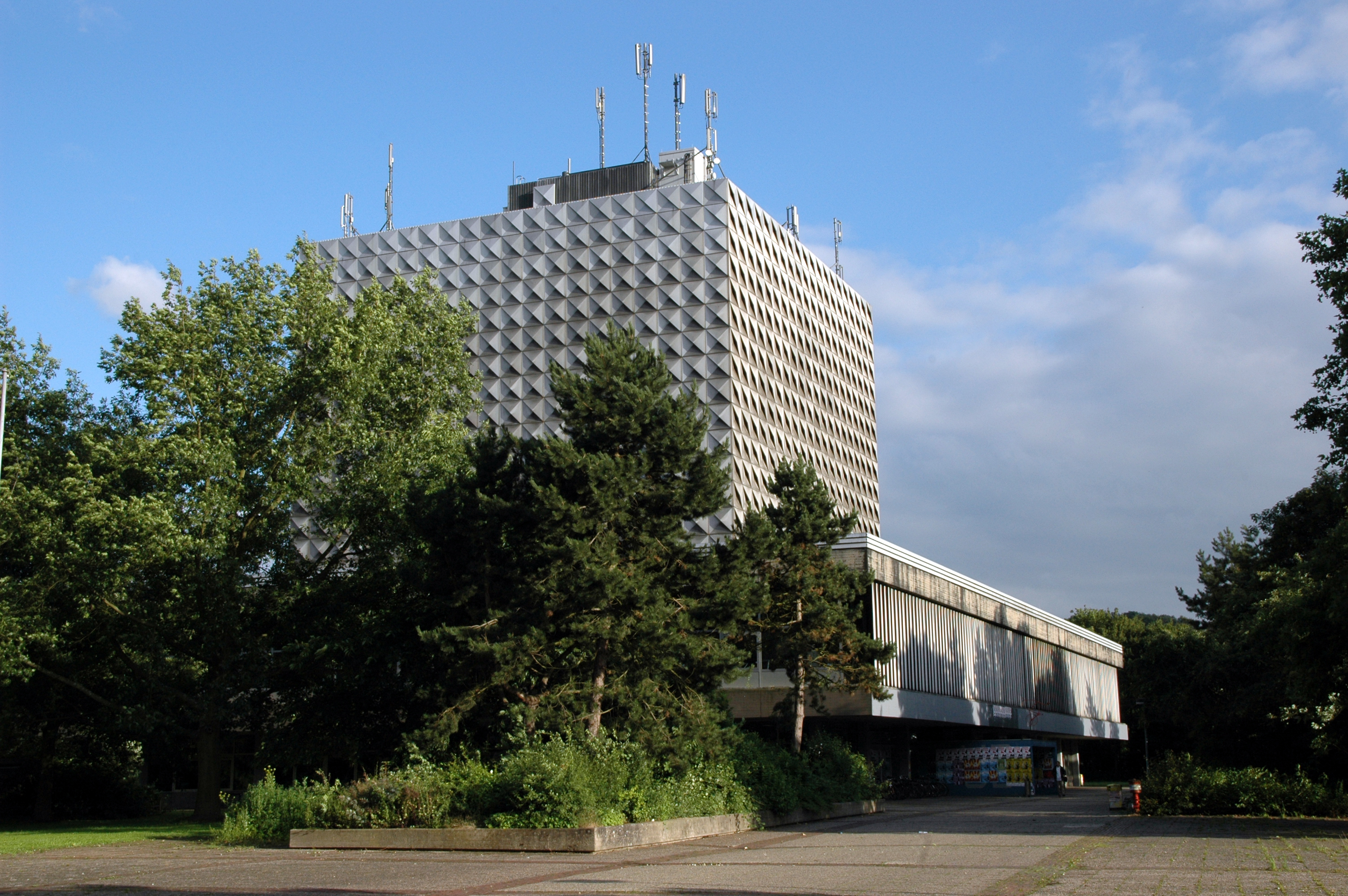 Universitätsbibliothek Marburg, Außenansicht